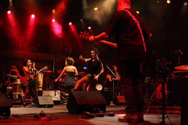 Show da banda DonaZica no SESC Pompeia, em 28 de agosto de 2009. Foto: Gustavo Madeira